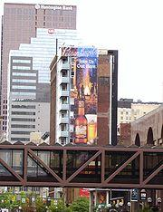 Columbus skywalk Downtown